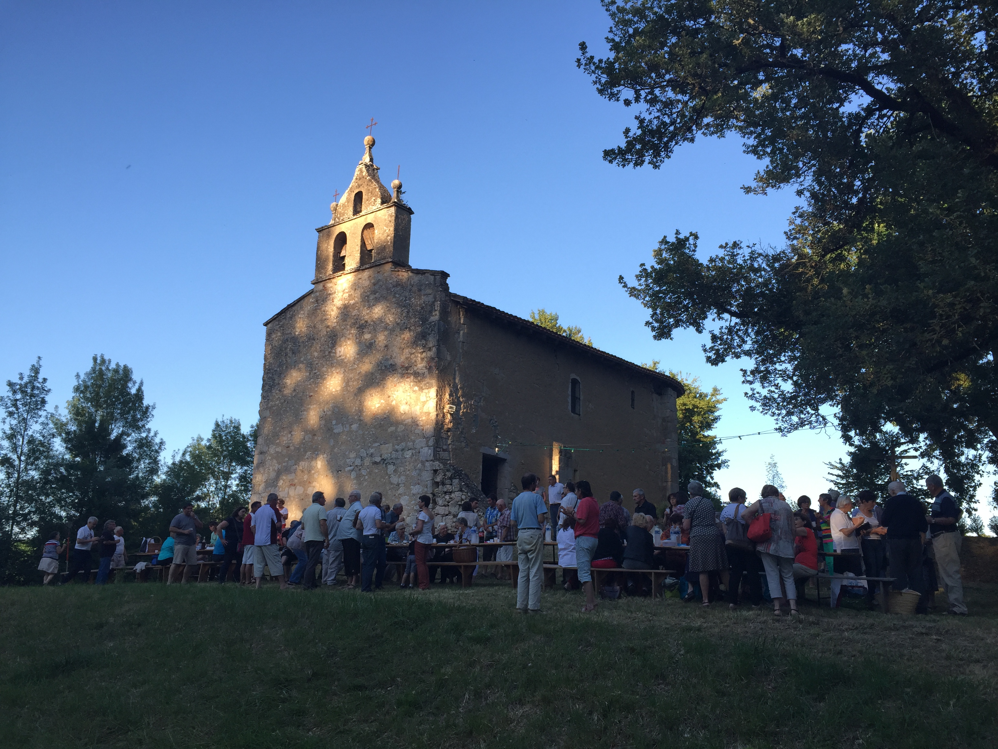 Church